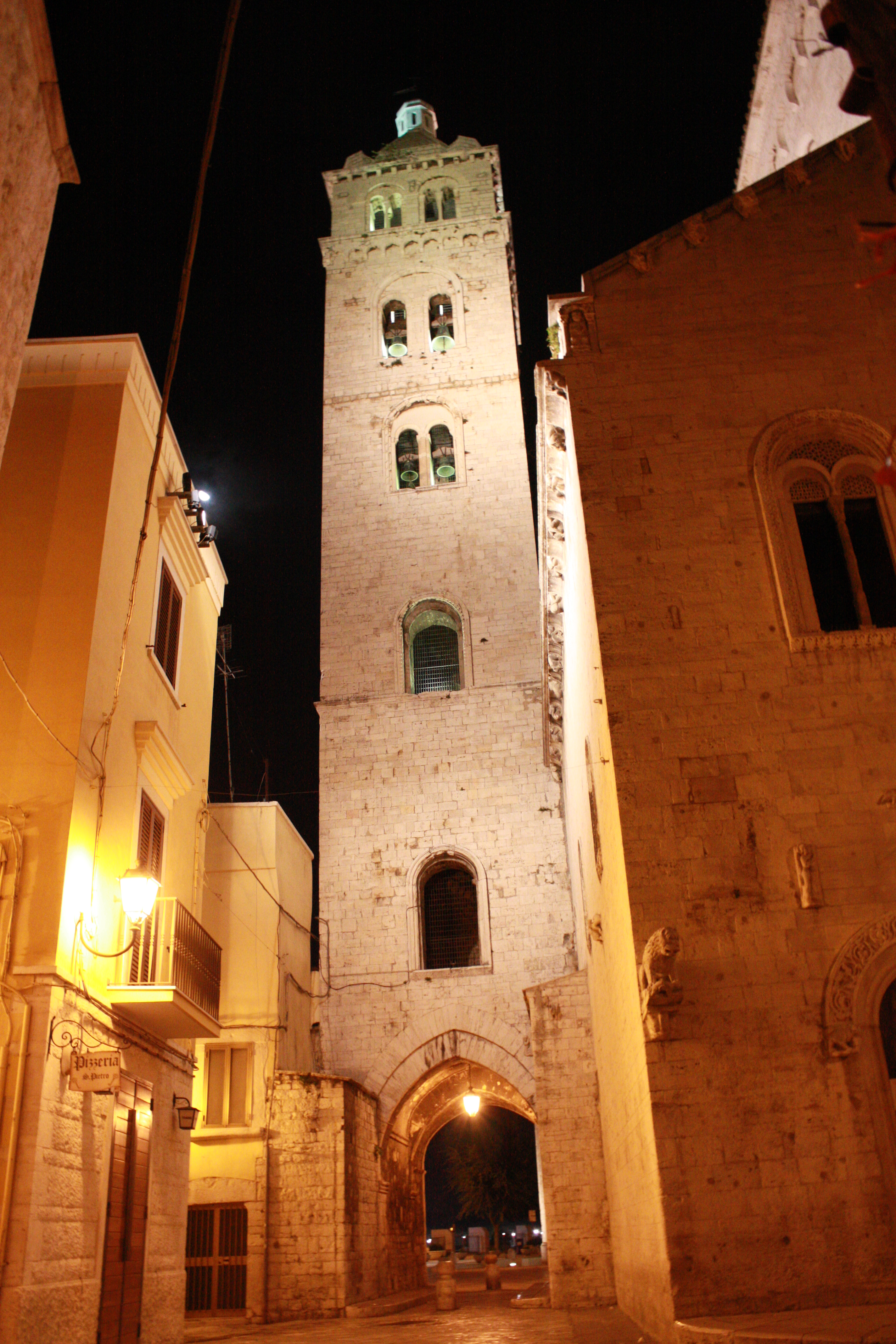 Campanile della Cattedrale Santa Maria Maggiore di Barletta